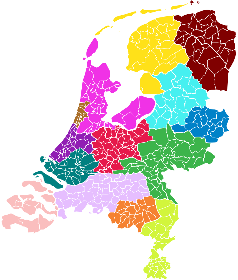 Afdelingen Jonge Socialisten in de PvdA